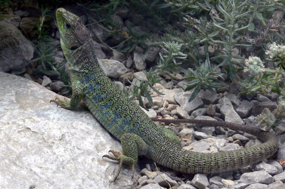 Timon lepidus